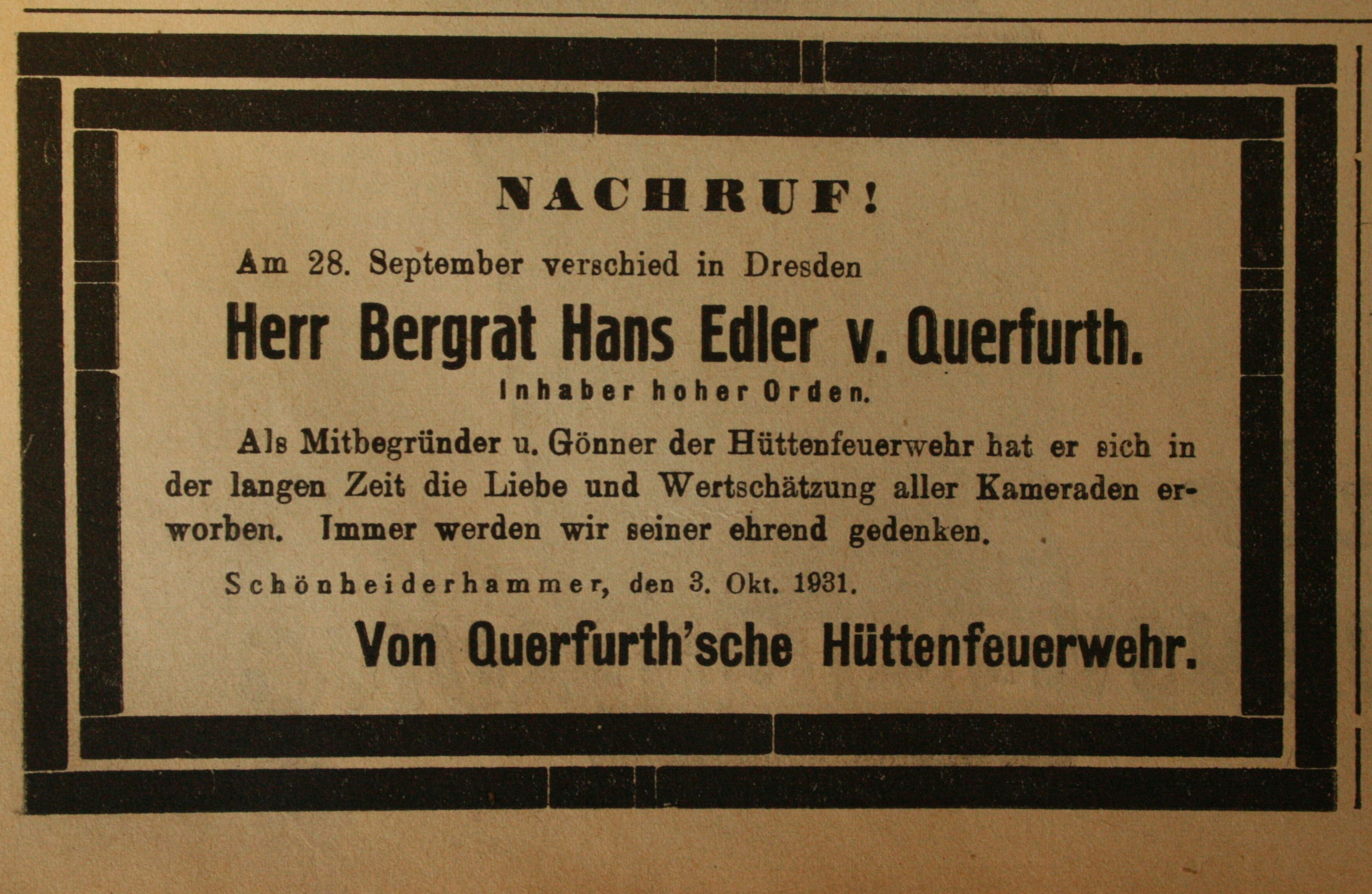 Traueranzeige der Hüttenfeuerwehr Hans Edler von Querfurth im Schönheider Wochenblatt 3. Oktober 1931